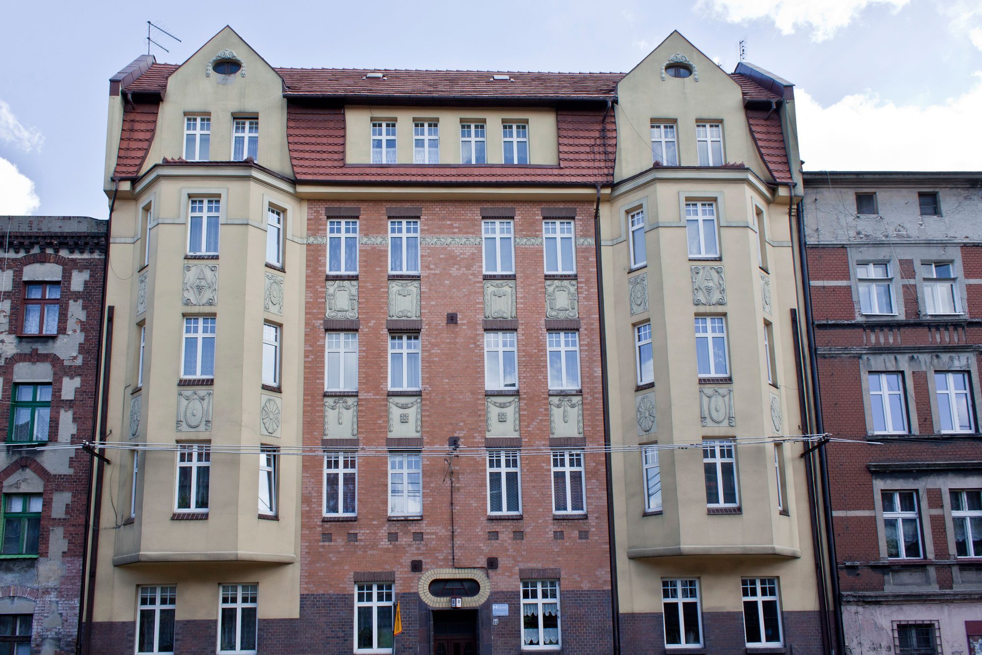 Kamienica z ok. 1905 r. ul. Witczaka 80. Bytom